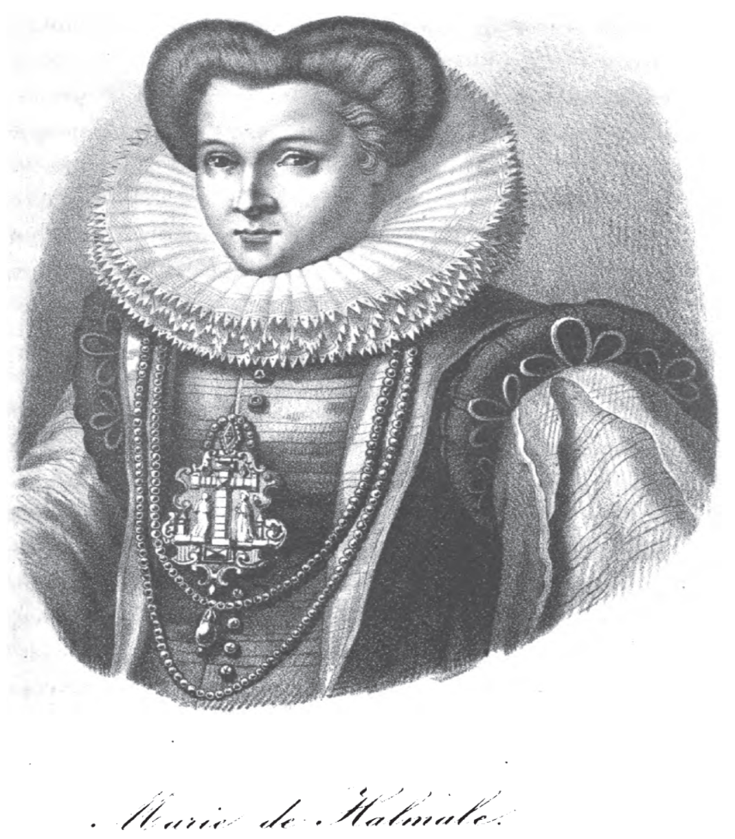 Marie de Halmale, épouse de Herman de Lynden, gravure parue dans la Notice historique sur l'ancien comte imperial de Reckheim